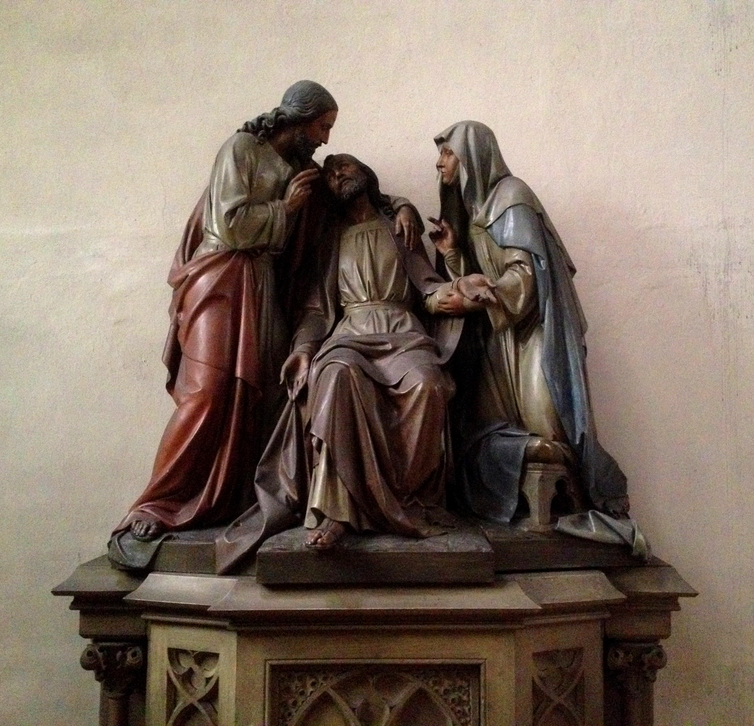 Lügde, St. Marien, Skulpturengruppe Tod Josefs